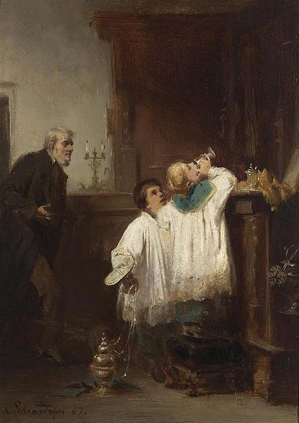 Ertappte Ministranten von Claudis Schraudolph dem Jüngeren